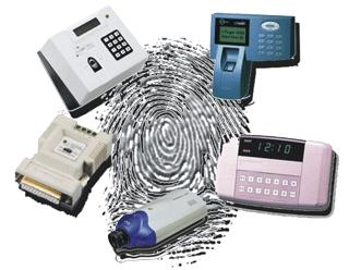 daktyloskopia pouzitie v praxi